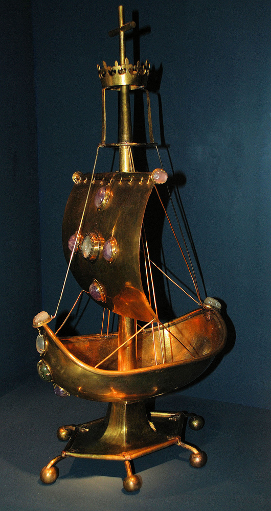 Uelzen, St. Marien, Goldenes Schiff. Tafelaufsatz oder Reliquiar aus 12./13. Jahrhundert.